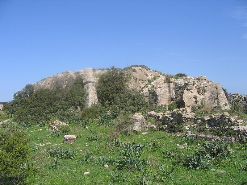 מבצר דטרוא תמונה שצילמתי והעלתי במרץ 2006. אסף.צ 14:09, 3 מרץ 2006 (UTC) Destroit fortress, Israel